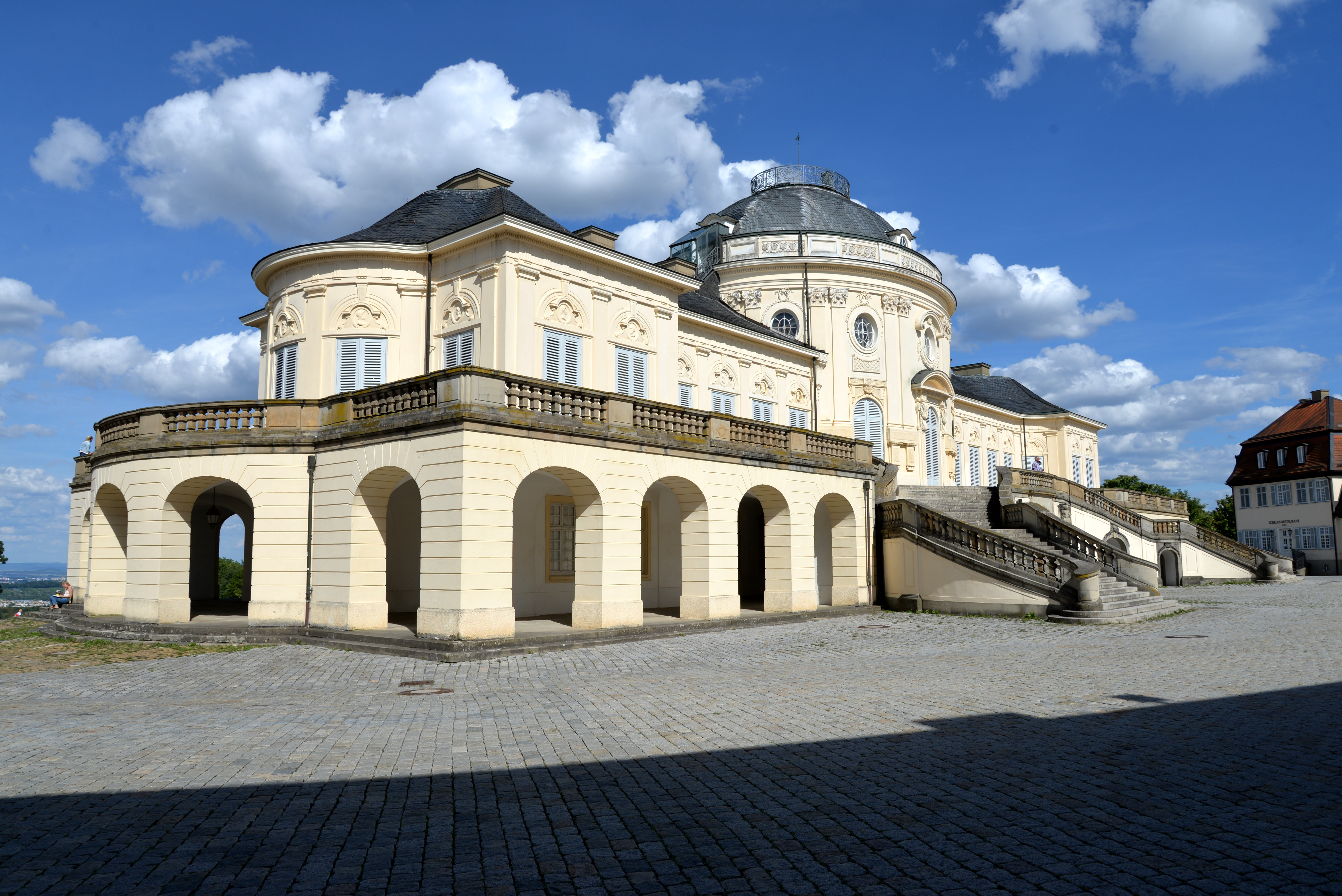 Bade-Wurttemberg, Stuttgart, château Solitude